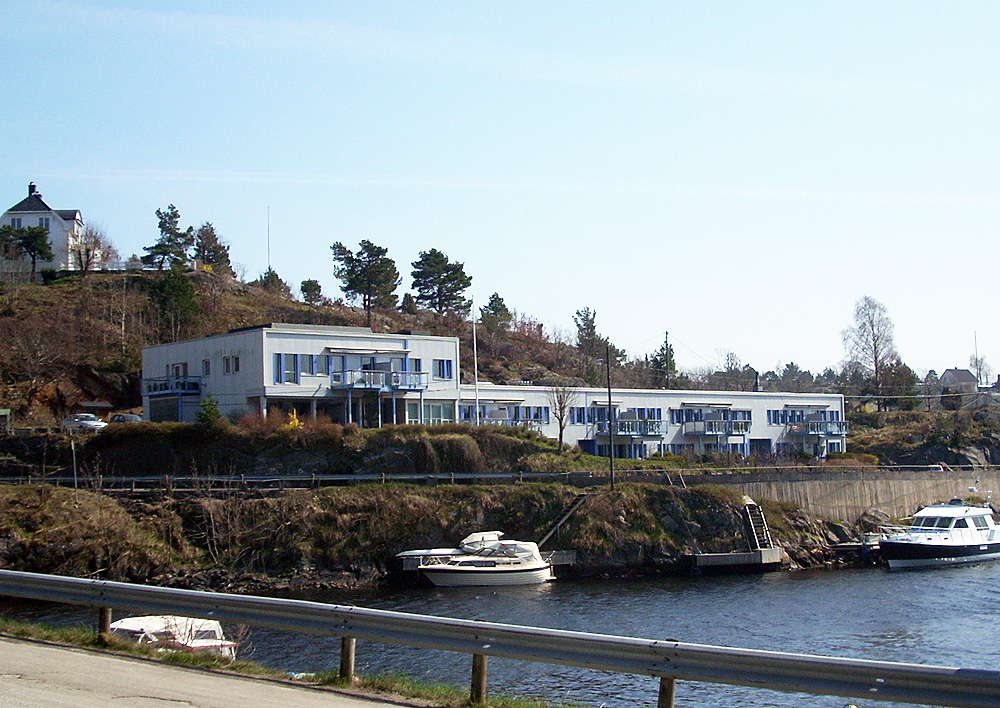 Gamle Moland kommunehus på Eydehavn, bygget om til leiligheter